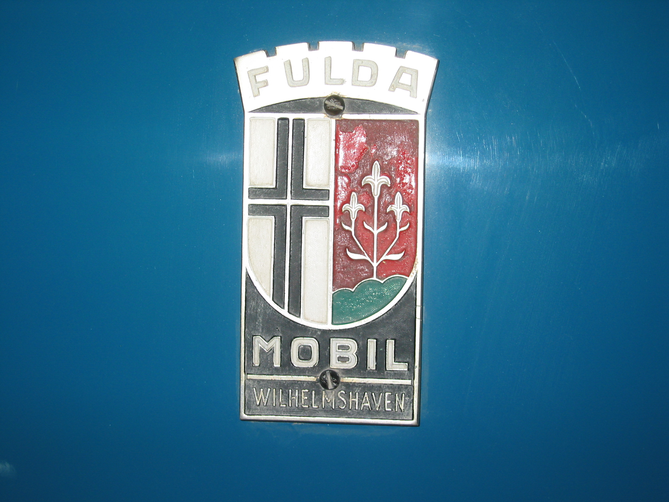 Emblem Fuldamobil